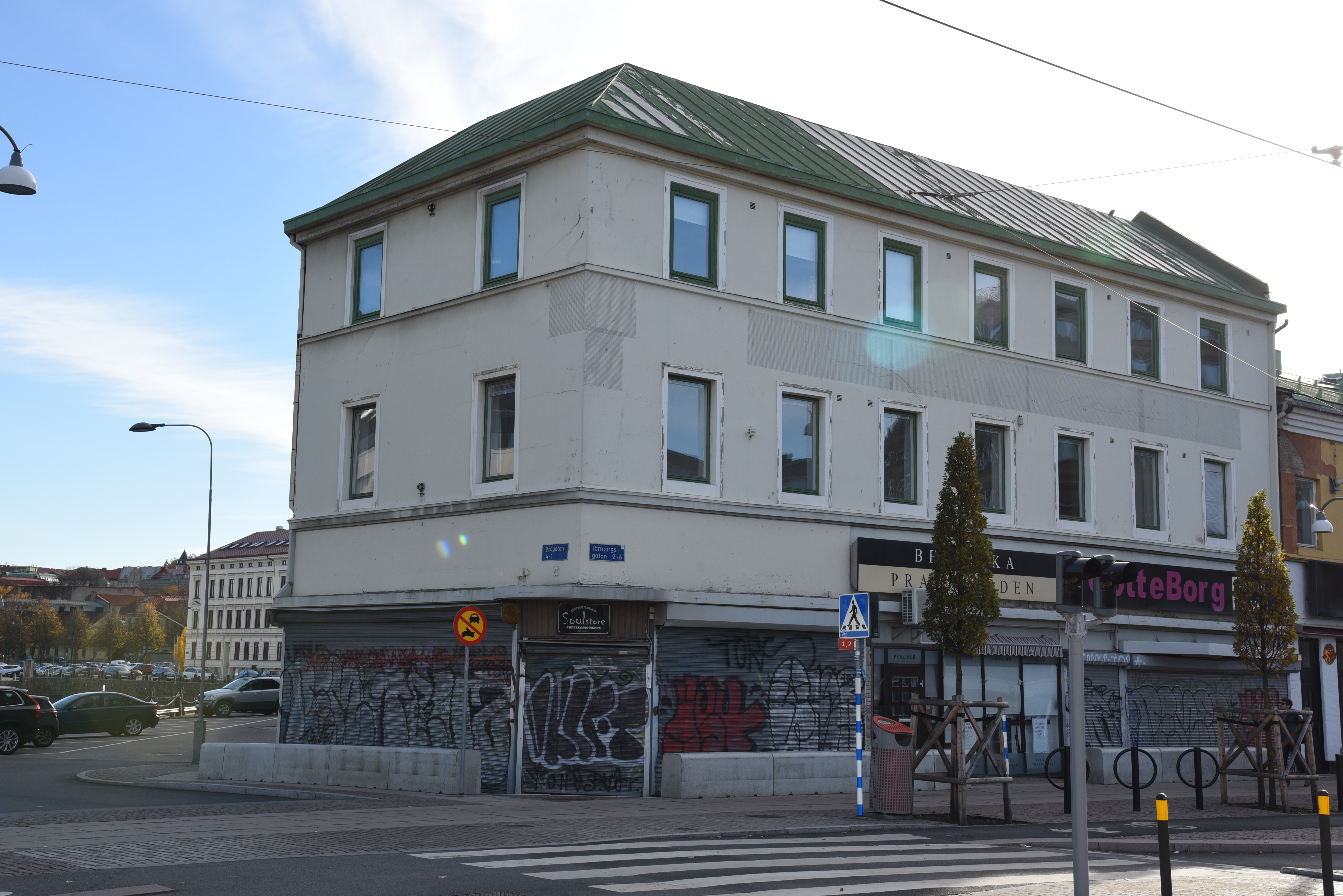 Brogatan 1 - Järntorgsgatan 2 i 3 kvarteret Röda Bryggan i stadsdelen Pustervik i Göteborg. Huset uppfört omkring 1860. I huset fanns tidigare klädbutiken Gulins. Fasaden mot Järntorgsgatan 2.